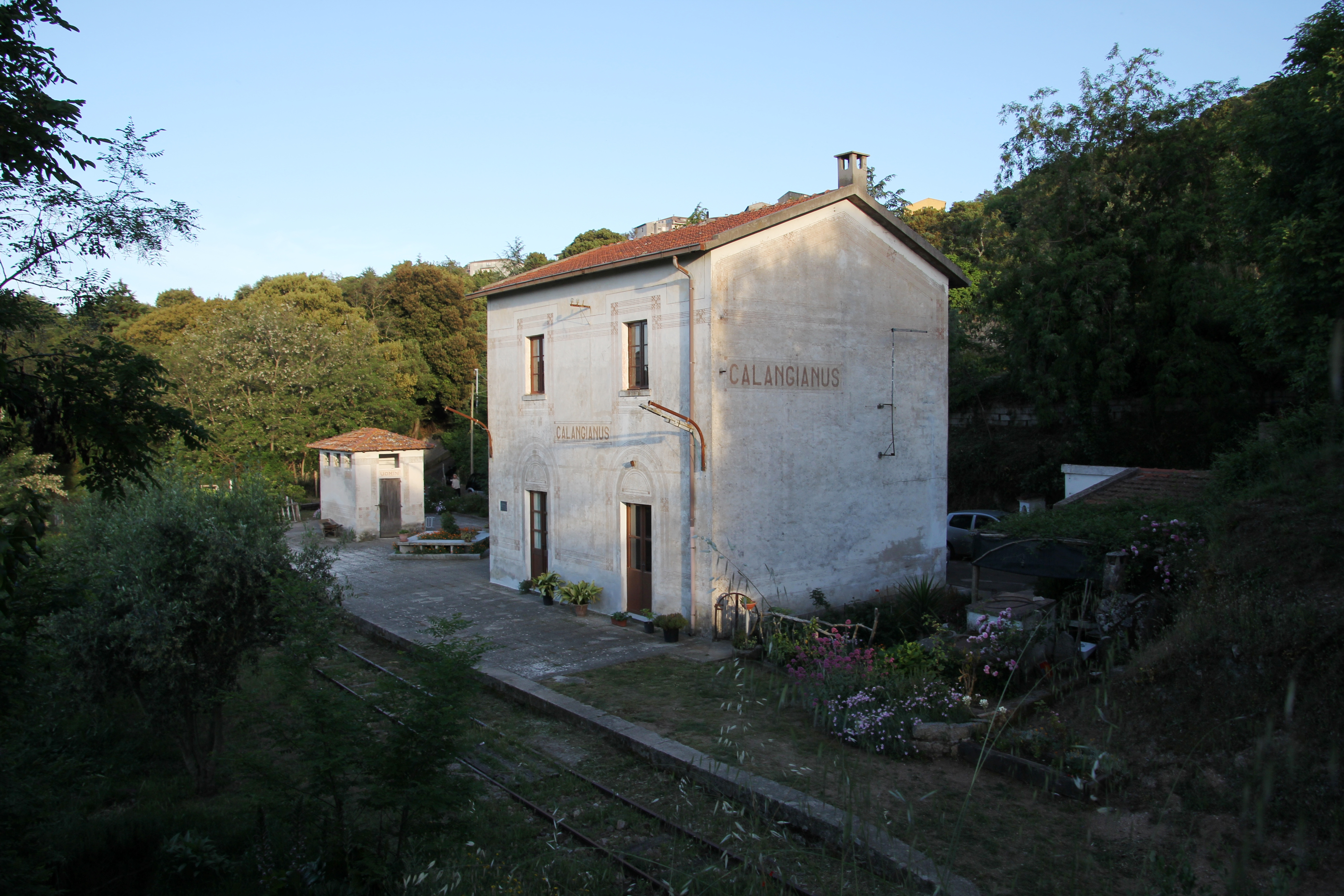 Calangianus - Stazione ferroviaria